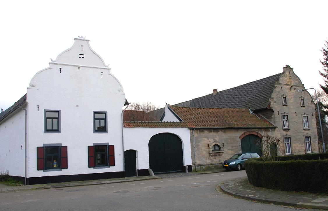 Limburgs: Vervanging van ièrder foto. Arensgenhout mergele haof foto: Els Diederen 2007 Aelske